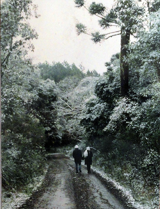 Neve em parque de caxias do sul